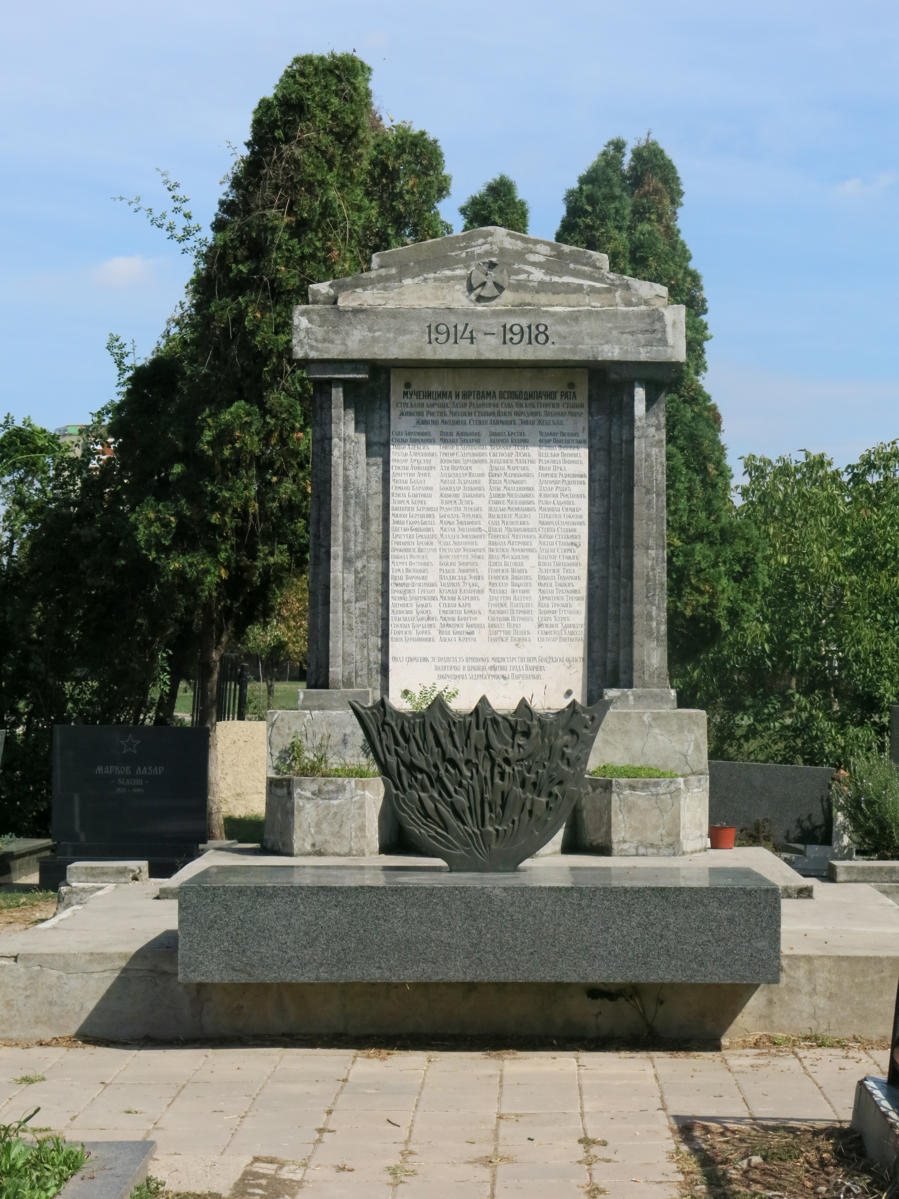 Надгробни споменик борцима из I светског рата и жртвама фашистичког терора из II светског рата